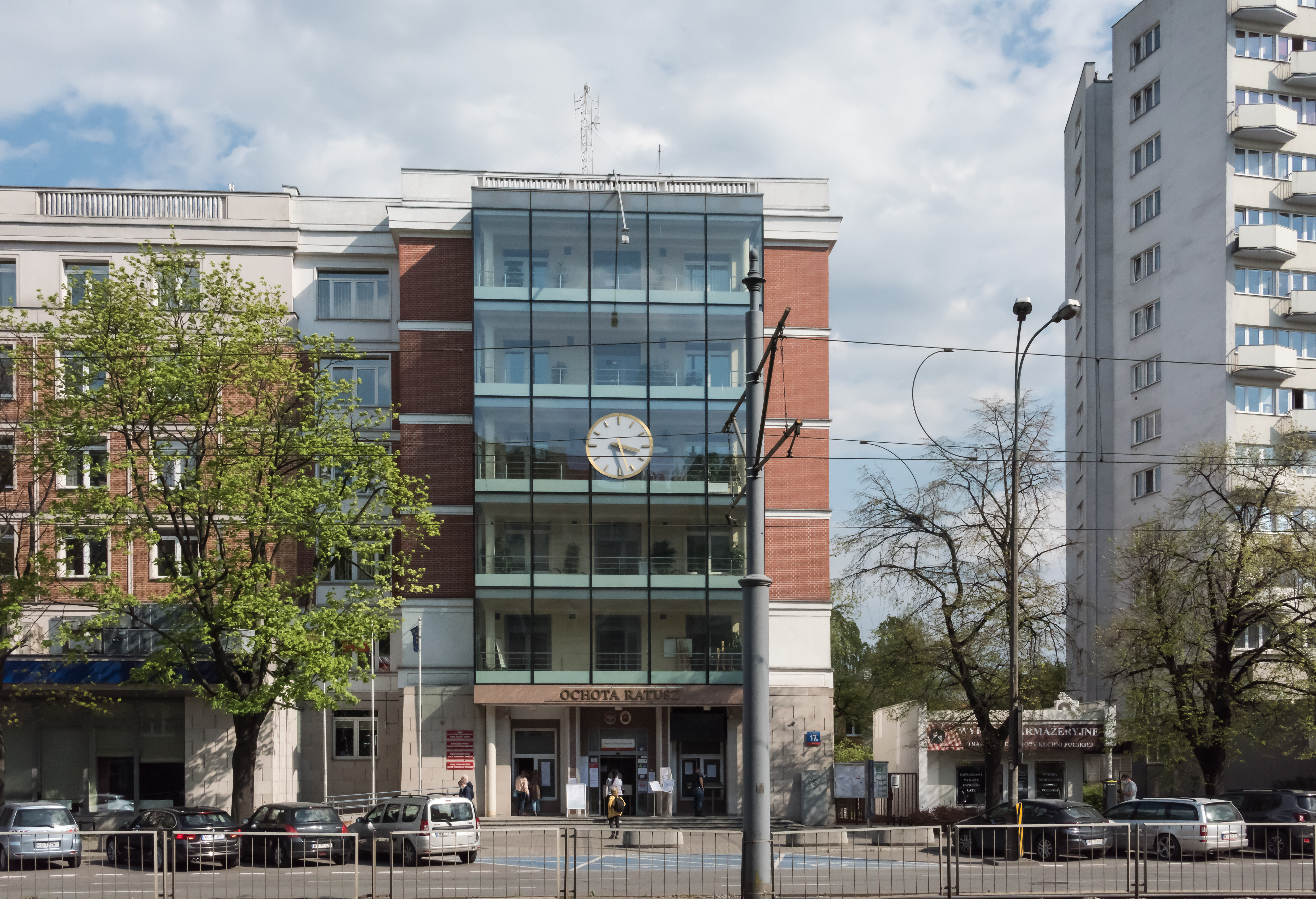 Ratusz Urzędu Dzielnicy Ochota m.st. Warszawy przy ul. Grójeckiej 17a w Warszawie